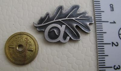 Odznaka Szkoły Podchorążych Agricola bez zielonej emalii.